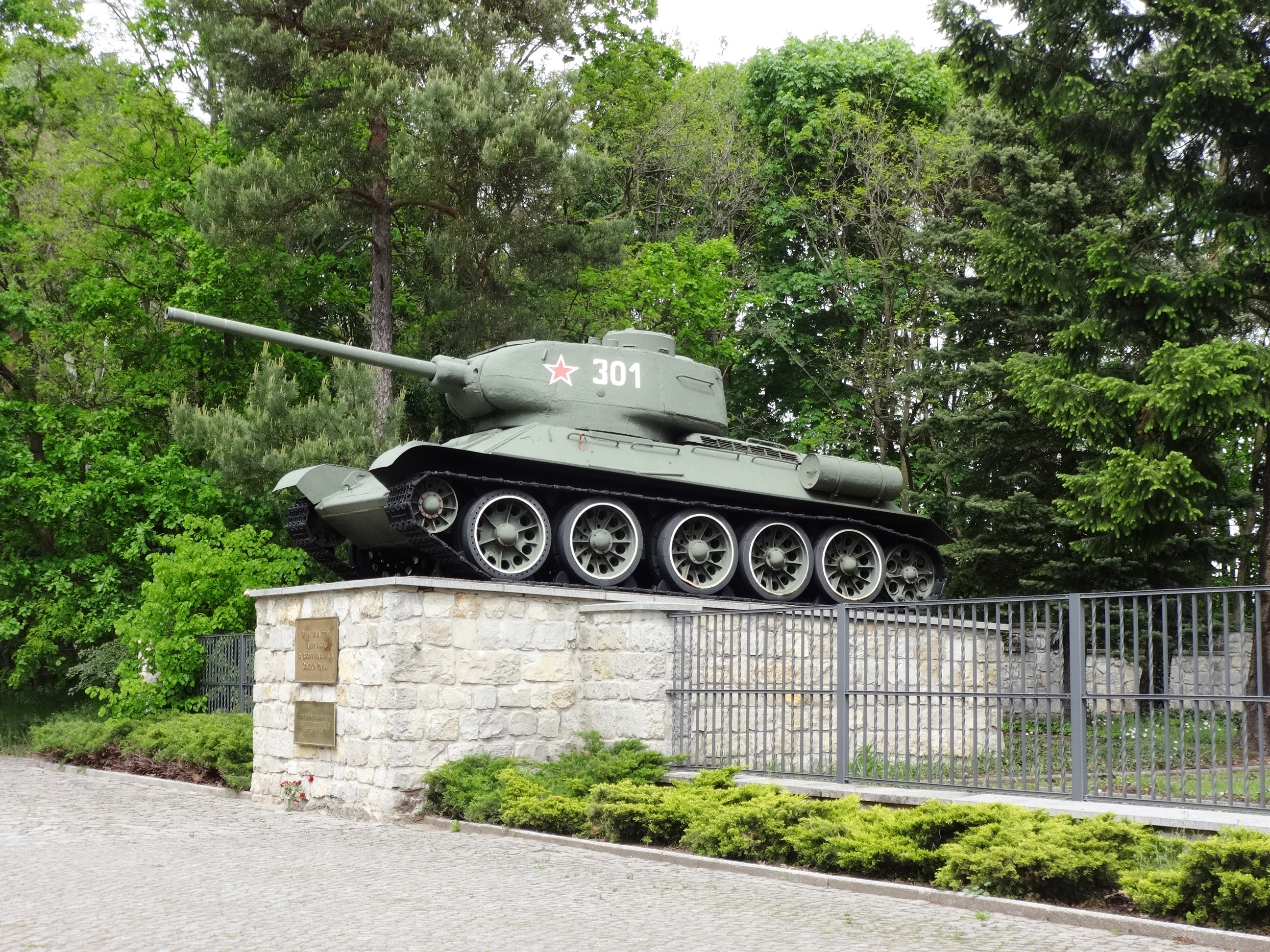 Der Sowjetische Ehrenfriedhof ist eine Gedenkstätte in Baruth/Mark im Landkreis Teltow-Fläming in Brandenburg (Deutschland). Sie erinnert an die im Kessel von Halbe gefallenen Soldaten der 3. und 4. Panzerarmee der Roten Armee und gilt als eine der größten und bedeutendsten russischen Kriegsgräberstätten in Brandenburg.